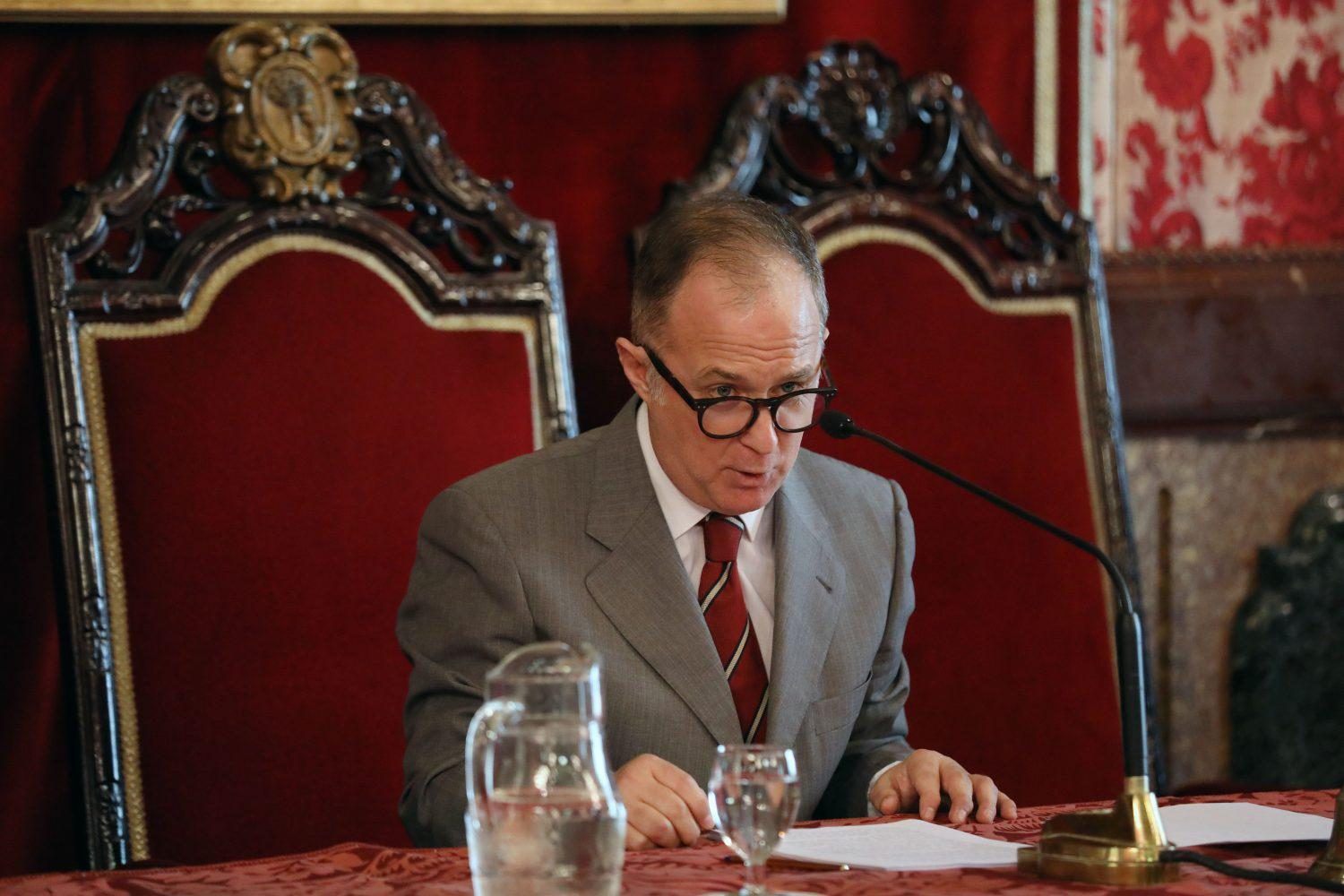 Enrique Tierno Galván, el primer alcalde de Madrid, del actual periodo democrático, nació en la capital hace cien años y el Ayuntamiento quiere recordarle con el cariño y la cercanía que le caracterizaron como persona y como regidor. Para conmemorar el centenario del que fuera uno de los alcaldes más carismáticos y queridos por los madrileños, el Ayuntamiento de Madrid ha programado una serie de actos de homenaje que bajo el lema ‘Tierno Galván, 100 años’, han arrancado hoy, 26 de abril, con una lectura dramatizada que recrea el Pleno de investidura del Viejo Profesor, celebrado el 19 de abril de 1979. El primero de los actos de homenaje se ha celebrado hoy bajo el nombre de ‘Pleno Galván’ ha sido una recreación dramatizada de la sesión de investidura de Tierno en el mismo lugar donde se celebró: el Salón de Plenos de la Casa de la Villa. Ha sido escrita y dirigida por el actor y dramaturgo Alberto San Juan, quien ha articulado la lectura acompañado por otros reconocidos actores como Luis Bermejo en el papel de Don Enrique Tierno Galván; Pedro Casablanc como Don José Luis Álvarez Álvarez; Luis Callejo como Don Alonso Puerta Gutiérrez; Alfonso Lara como Don Miguel Herrero Rodríguez de Miñón; Luis Moreno como Don José María Álvarez del Manzano e Iñigo Rodríguez como Don Ramón Tamames Gómez.